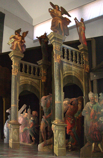 Altshausen: Heiliges Grab von 1783 (in der eigens errichteten Kapelle zur Ausstellung des Heiligen Grabes neben der Schlosskirche), Detail: Kulissenanordnung